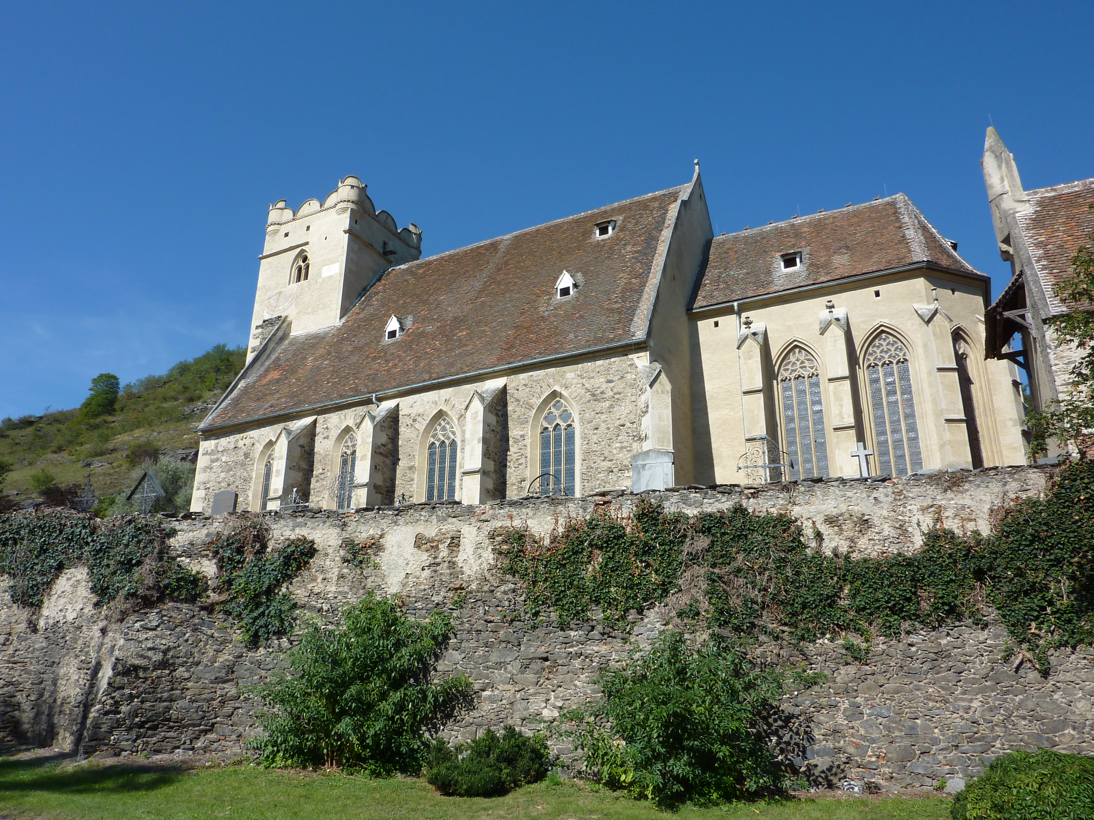 Filialkirche in St. Michael, Weißenkirchen in der Wachau, Niederösterreich